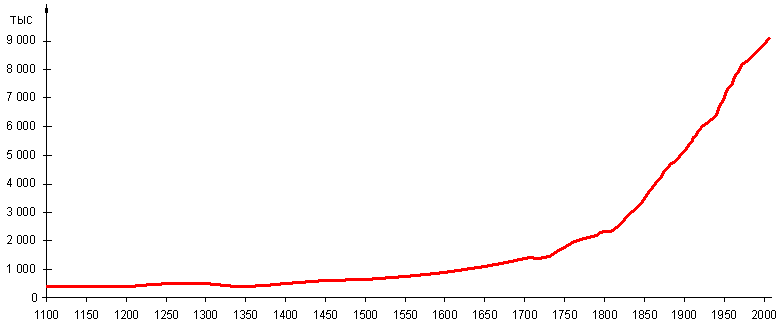 Динамика изменения числа жителей Швеции